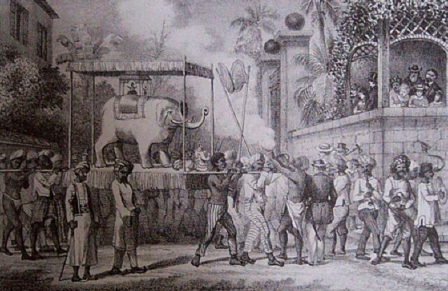 Fete des travailleurs indiens